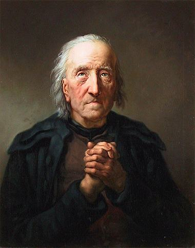 "Betender alter Mann", Schuster Johann Gottlob Reinhardt in Dresden-Friedrichstadt, Brückenstrase 9